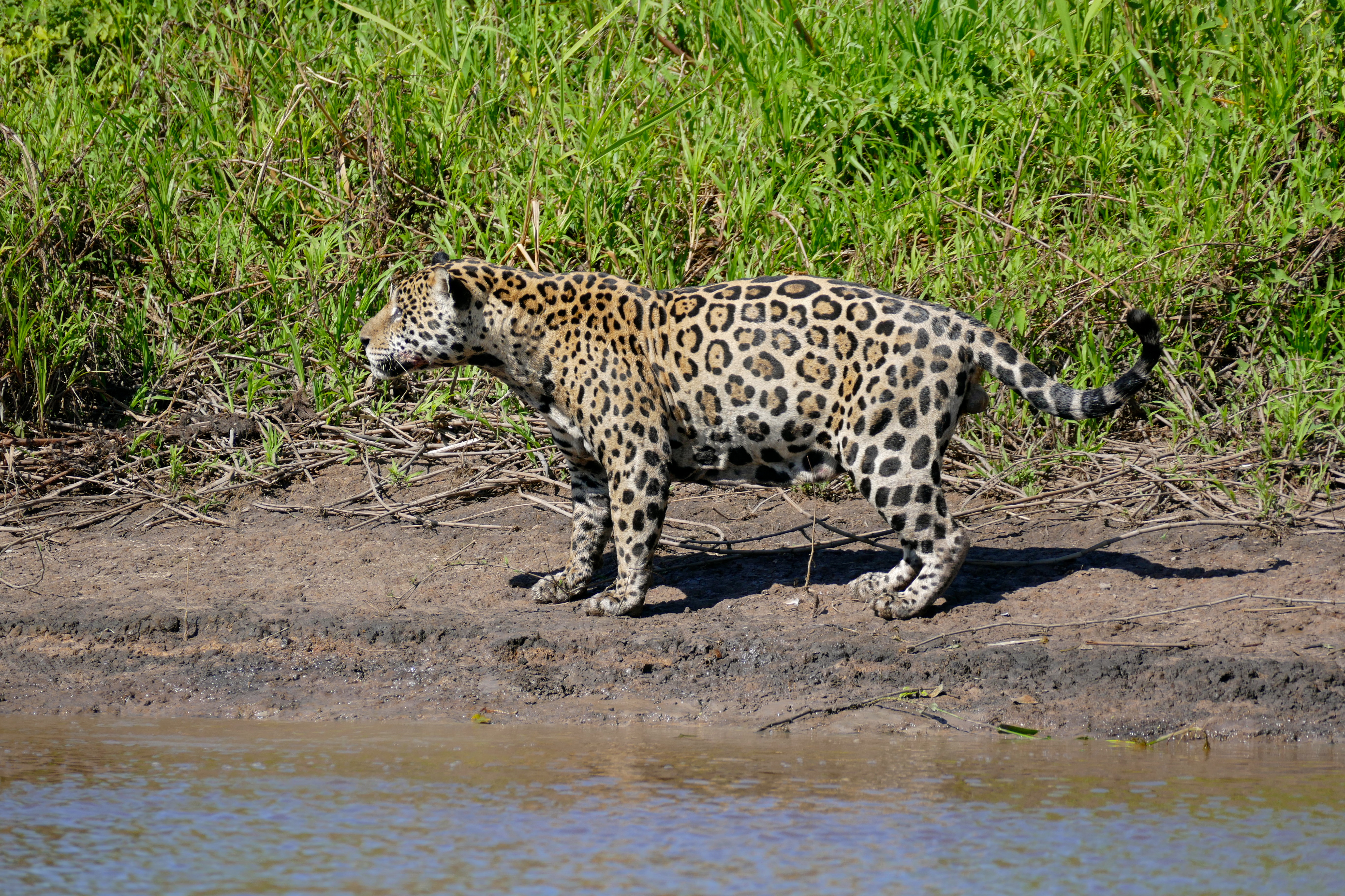 Rio São Lourenço, Porto Jofre, Pantanal, Poconé, Mato Grosso, BRAZIL